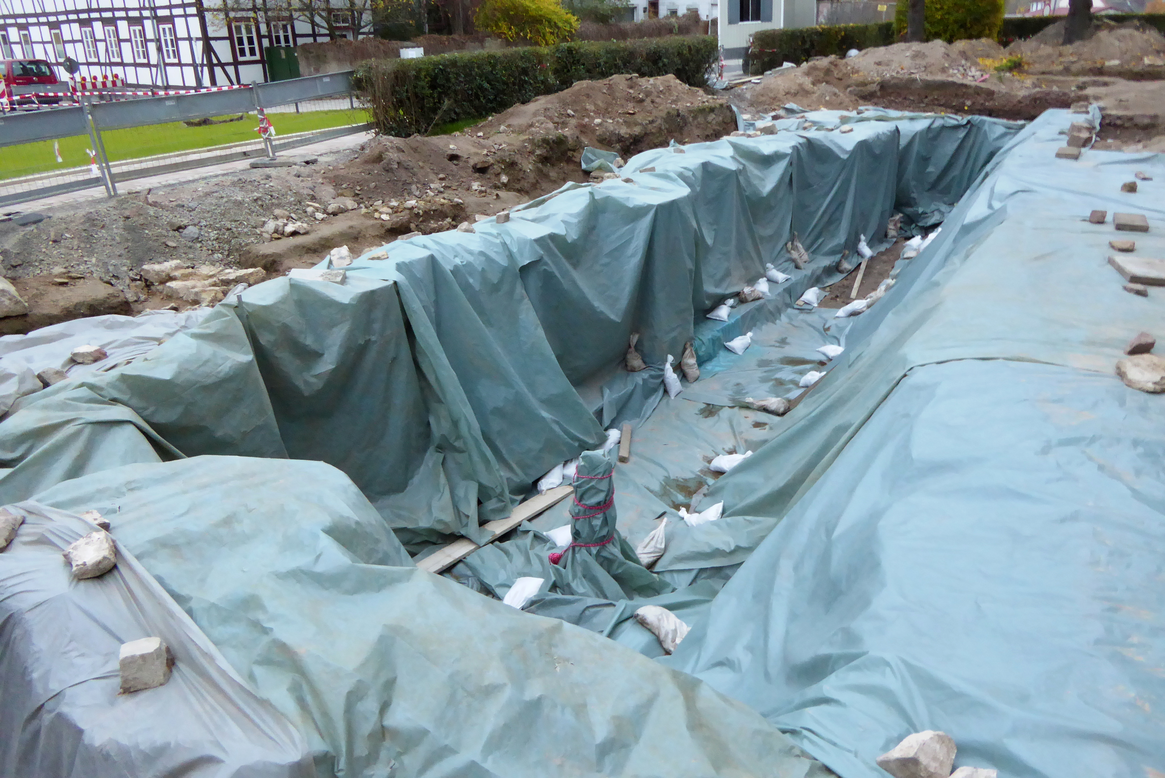 Stiftskrypta (Petersstift) der Vorgängerkirche von St. Martin in Nörten-Hardenberg, Landkreis Northeim, Südniedersachsen. Blick auf die mit Planen abgedeckte Grabungsstelle von Nordosten